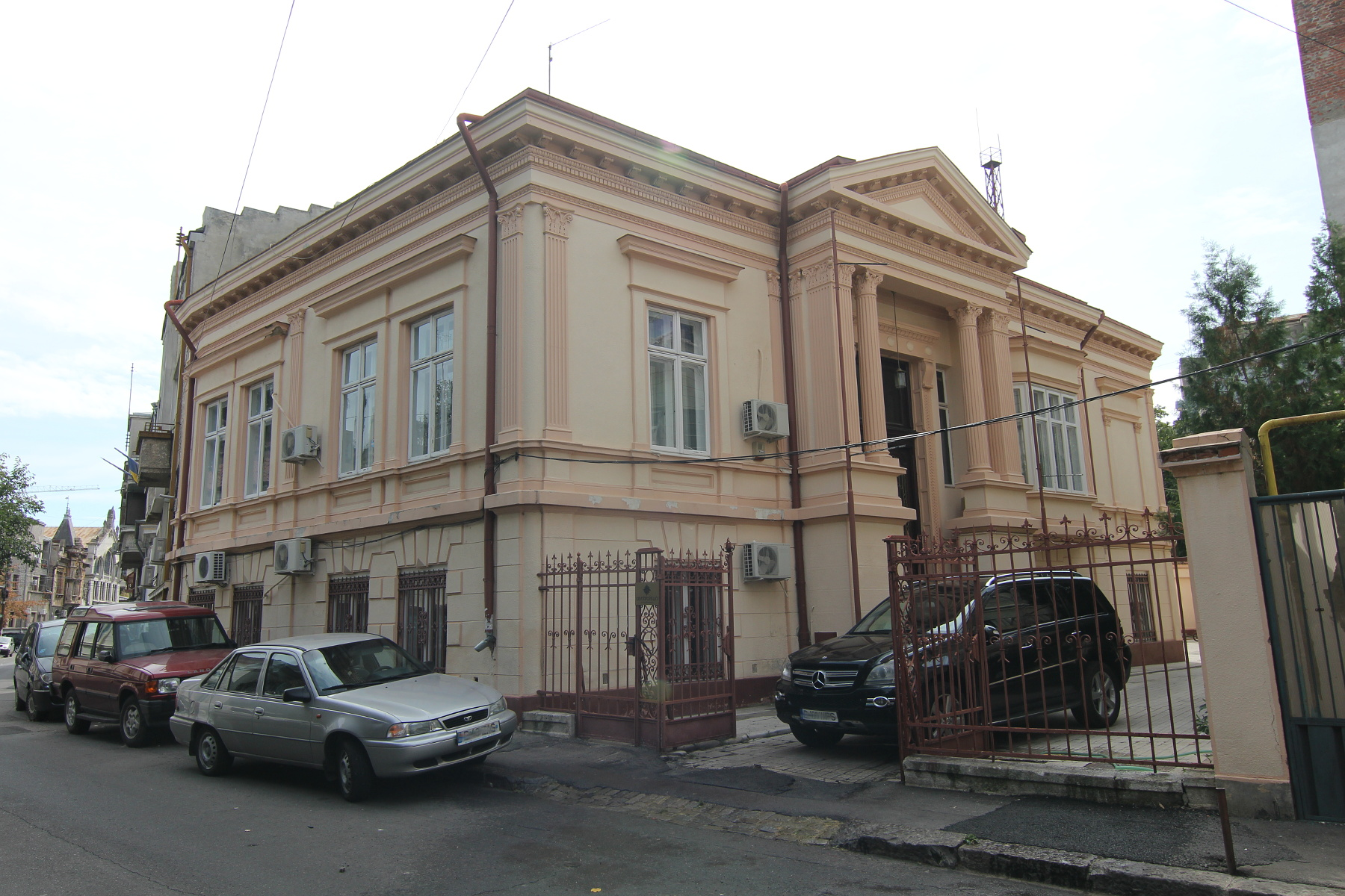 Casă pe Str Romulus